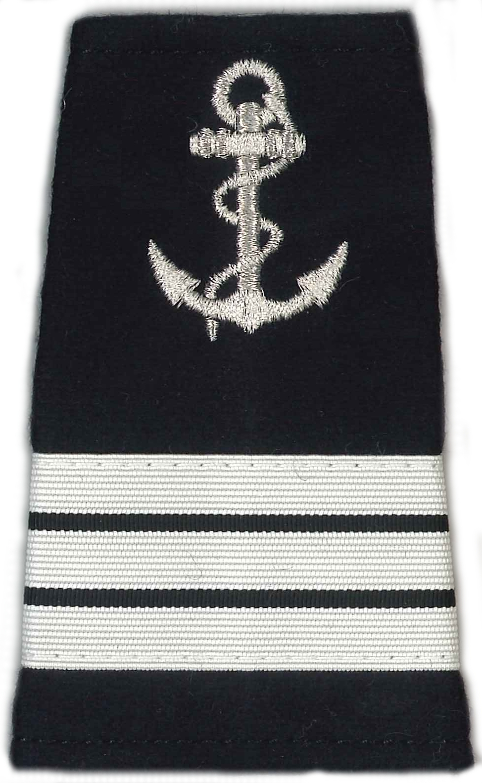 Fourreau d'épaule de contrôleur des affaires maritimes